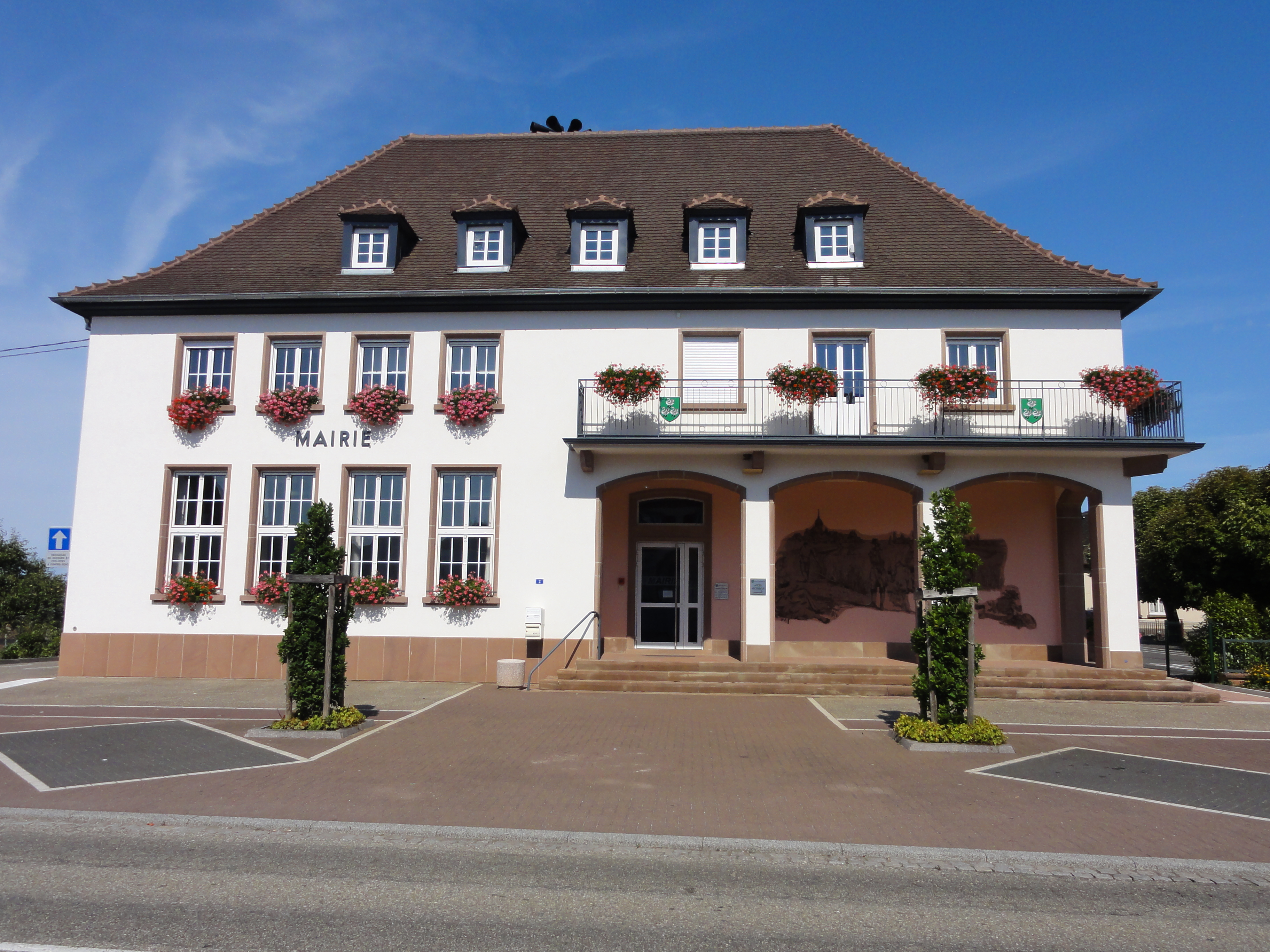 Alsace, Bas-Rhin, Sessenheim, Mairie-école (XXe), place de la Mairie.